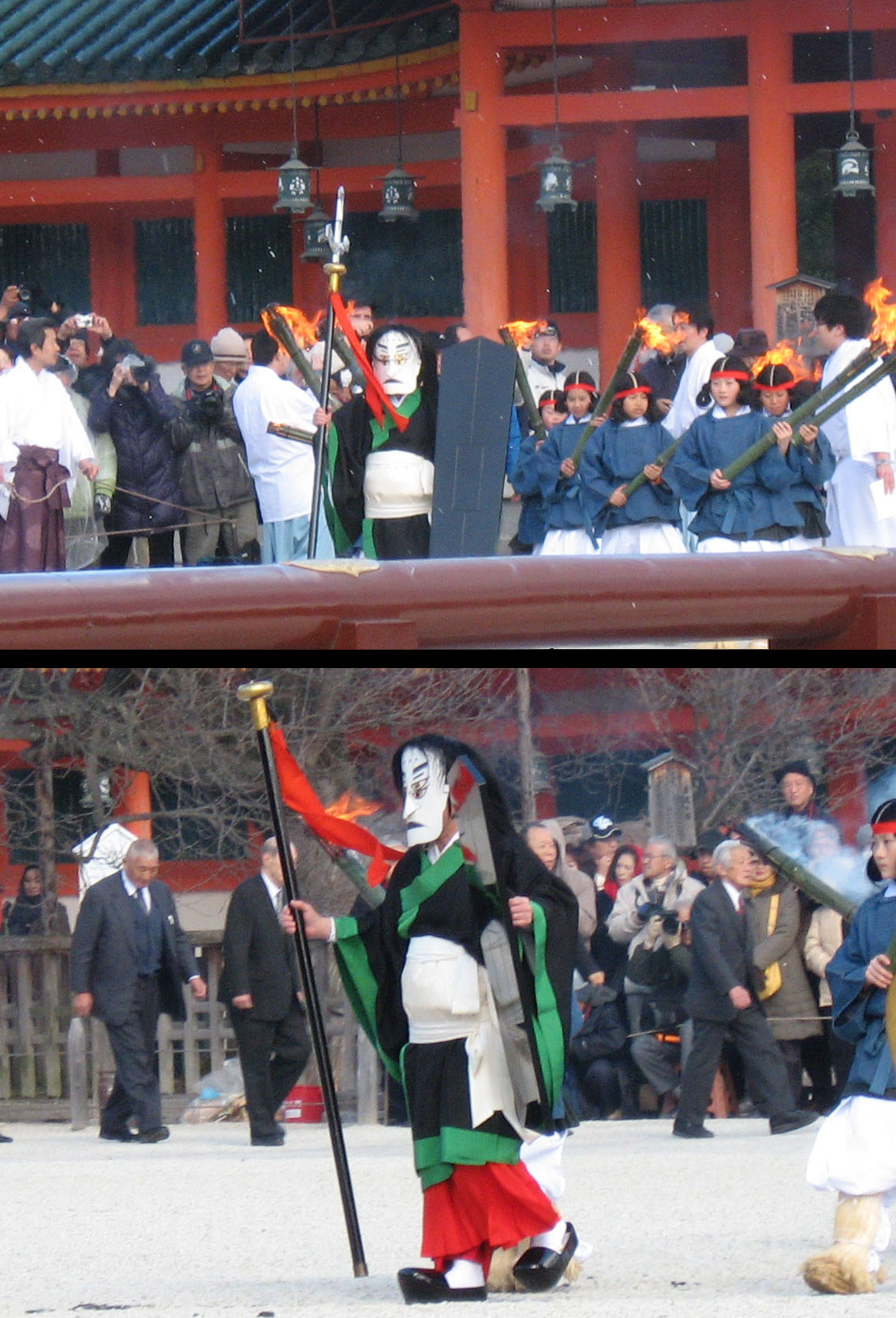 平安神宮 節分 追儺の儀における方相氏（京都市）